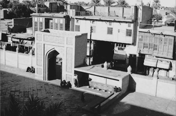 صورة للباب والسياج الخارجي لمبنى مرقد السيد إدريس في منطقة الكرادة الشرقية في بغداد، التقطت الصورة من اعلى المبنى ويشاهد البيوت القديمة حول المرقد، ويقال كان لمرقد السيد ادريس قبر صغير وبسيط ليس له قبة وغير مسور بسياج، وكان محاطا بالبساتين والمزارع وبجواره مقبرة صغيرة، وموقعه بالقرب من مستشفى الكلية العسكرية سابقا، ولقد عمر المبنى الشيخ مصطفى البغدادي وجدد بناء قبره وبنى لهُ قبة زرقاء اللون، أما السياج الخارجي فقد قام بتشييدهِ السيد أحمد جفال البكري أو البجري، في شهر أيلول من عام 1963م